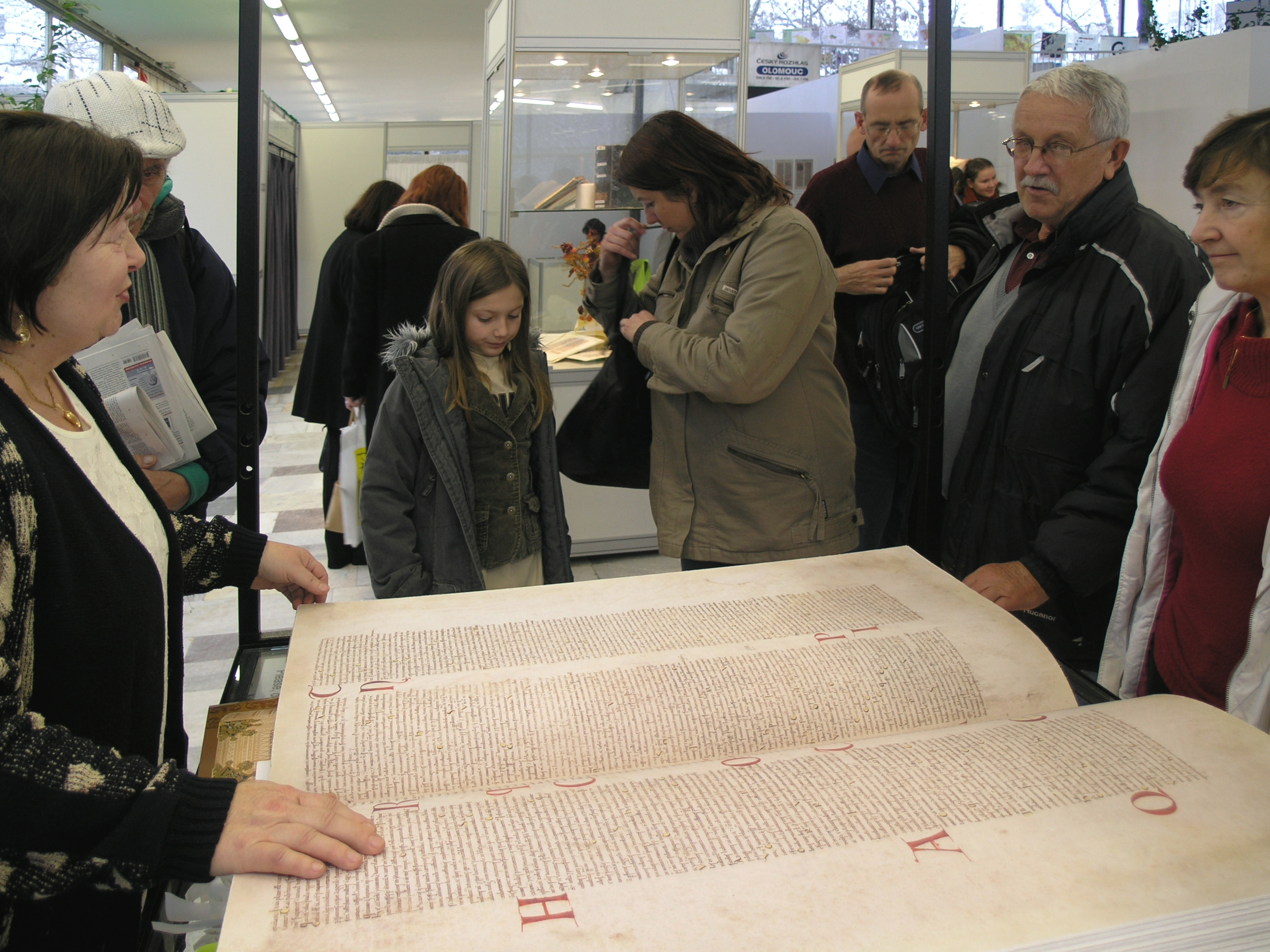 Olomouc, LIBRI 2008 - replika Ďáblovy bible